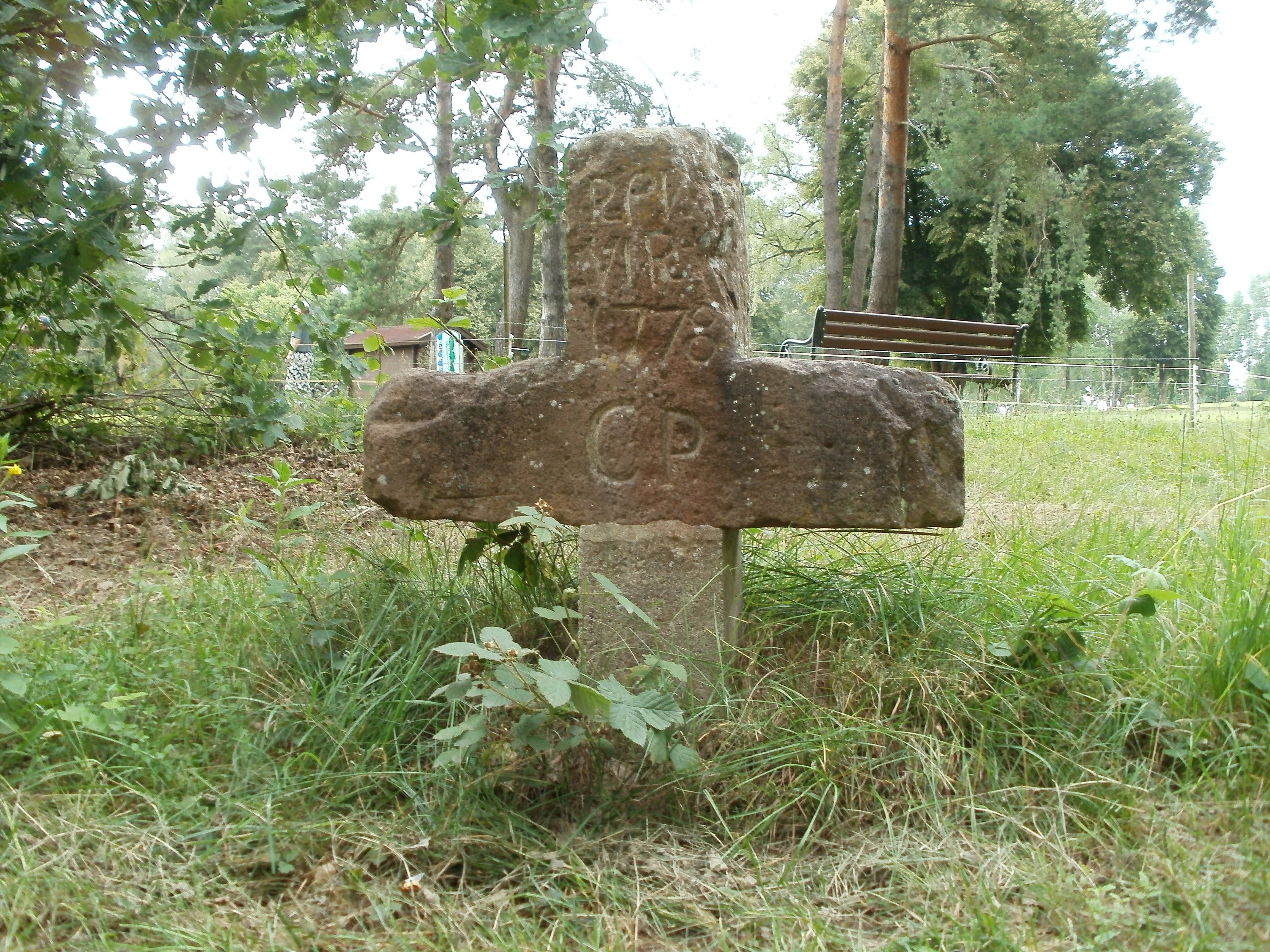 Herzogkreuz im Schwetzinger Hart bei Oftersheim